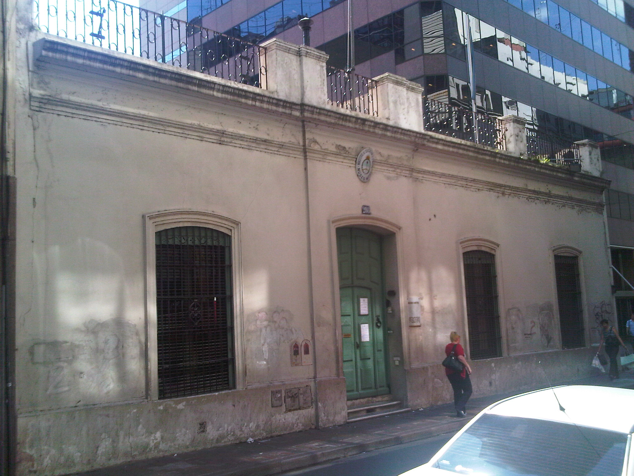 Frente del Museo Mitre